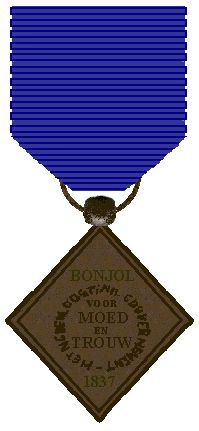 Ruit van Bonjol, Campain on Sumatra, 1837